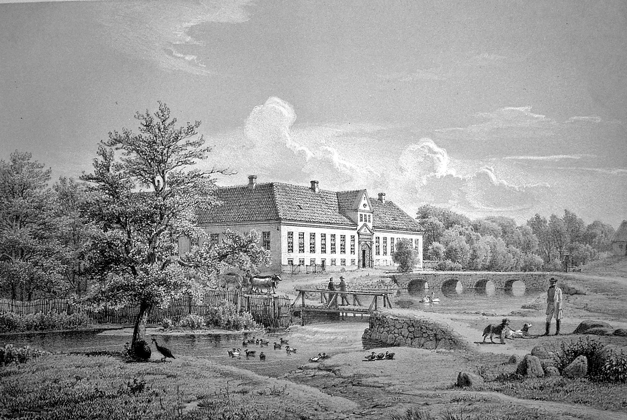 Store Restup, Sønderholm Sogn - Hornum Herred Ålborg/Nordjyllands Amt, Denmark